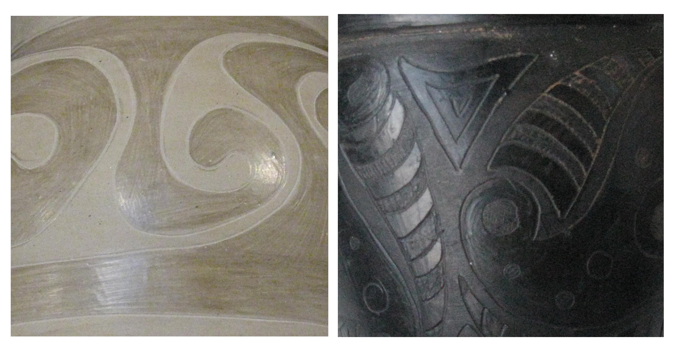 Лощення (полірування, гладження) на не випаленому та випаленому черепку.